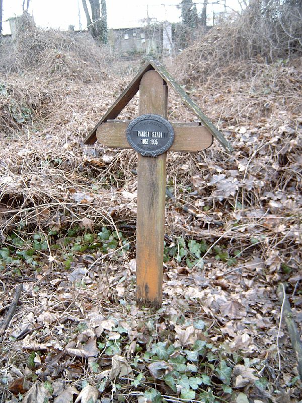 Rákosi Szidi sírja Budapesten. Kerepesi temető: 48/2-1-35.